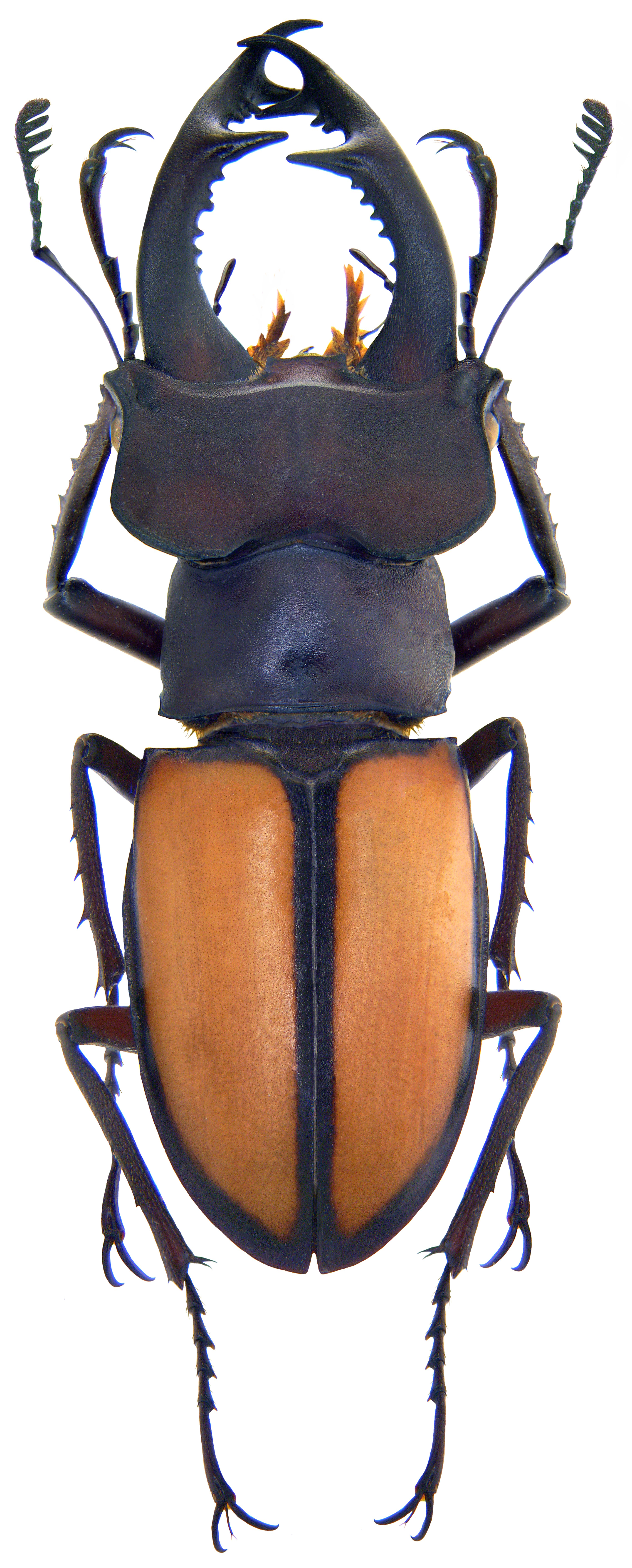 Familie: Lucanidae Groesse: 47 mm Verbreitung: China Fundort: China, Sichuan, Wushihe, Hanyuan, 2006 det. A.Skale, 2009 Photo: U.Schmidt, 2009